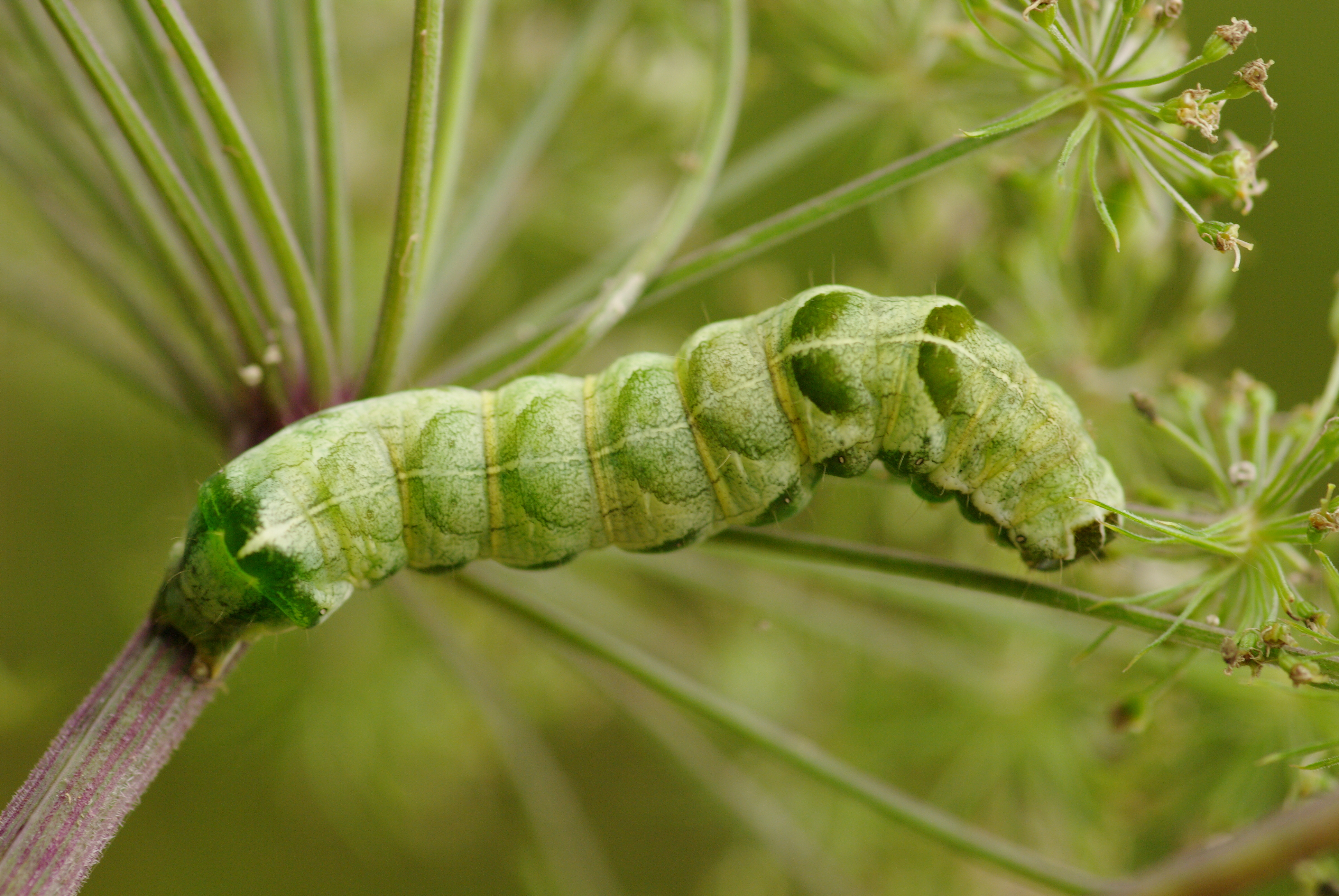 Chenille de Melanchra persicariae (la polygonière), forêt de Grimbosq, Calvados.